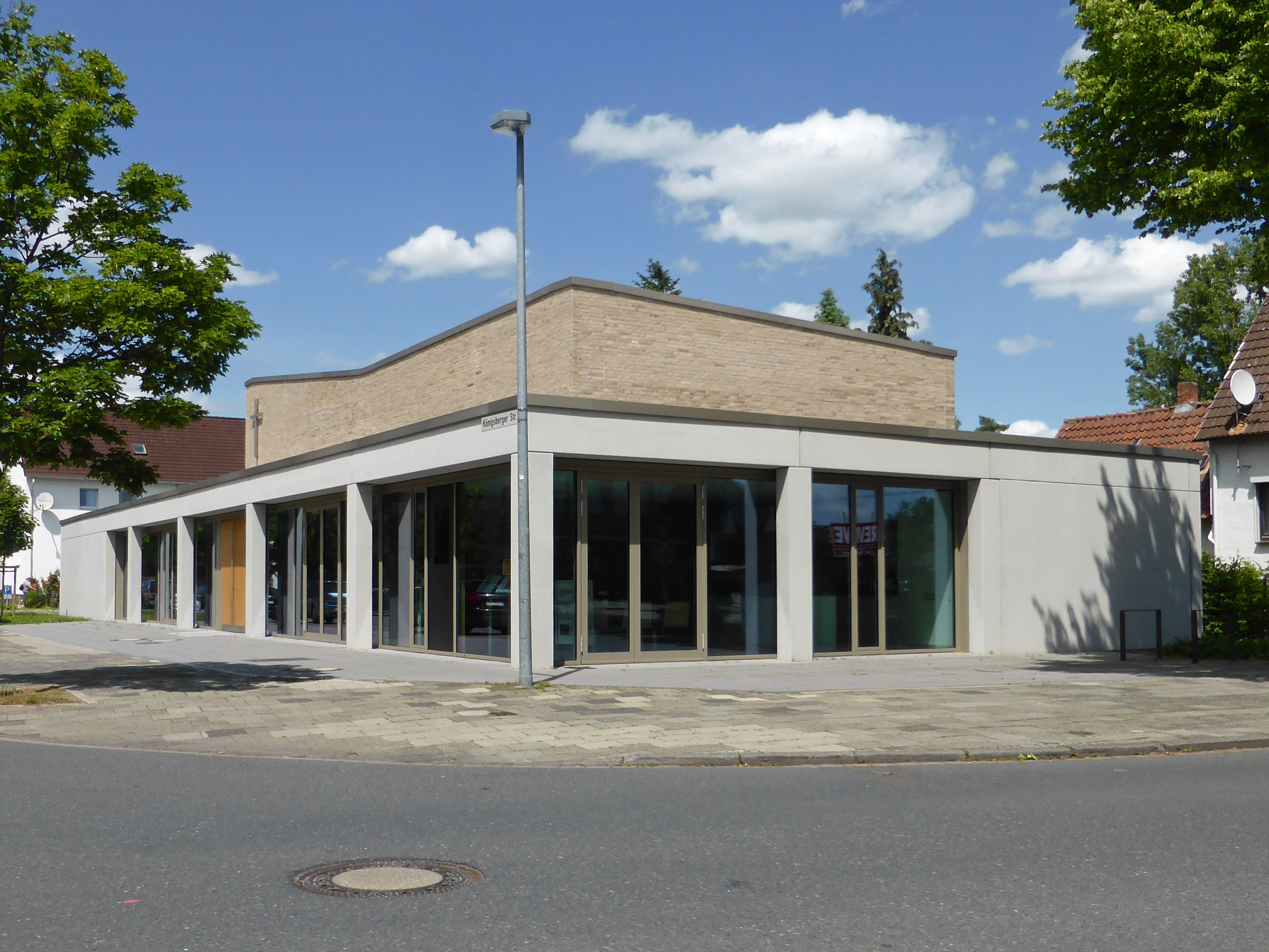 Neue katholische Heilig-Kreuz-Kirche in Altwarmbüchen.